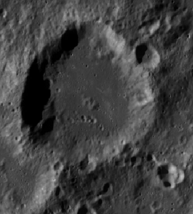 Cráter lunar Tseraskiy. (Imagen LRO)